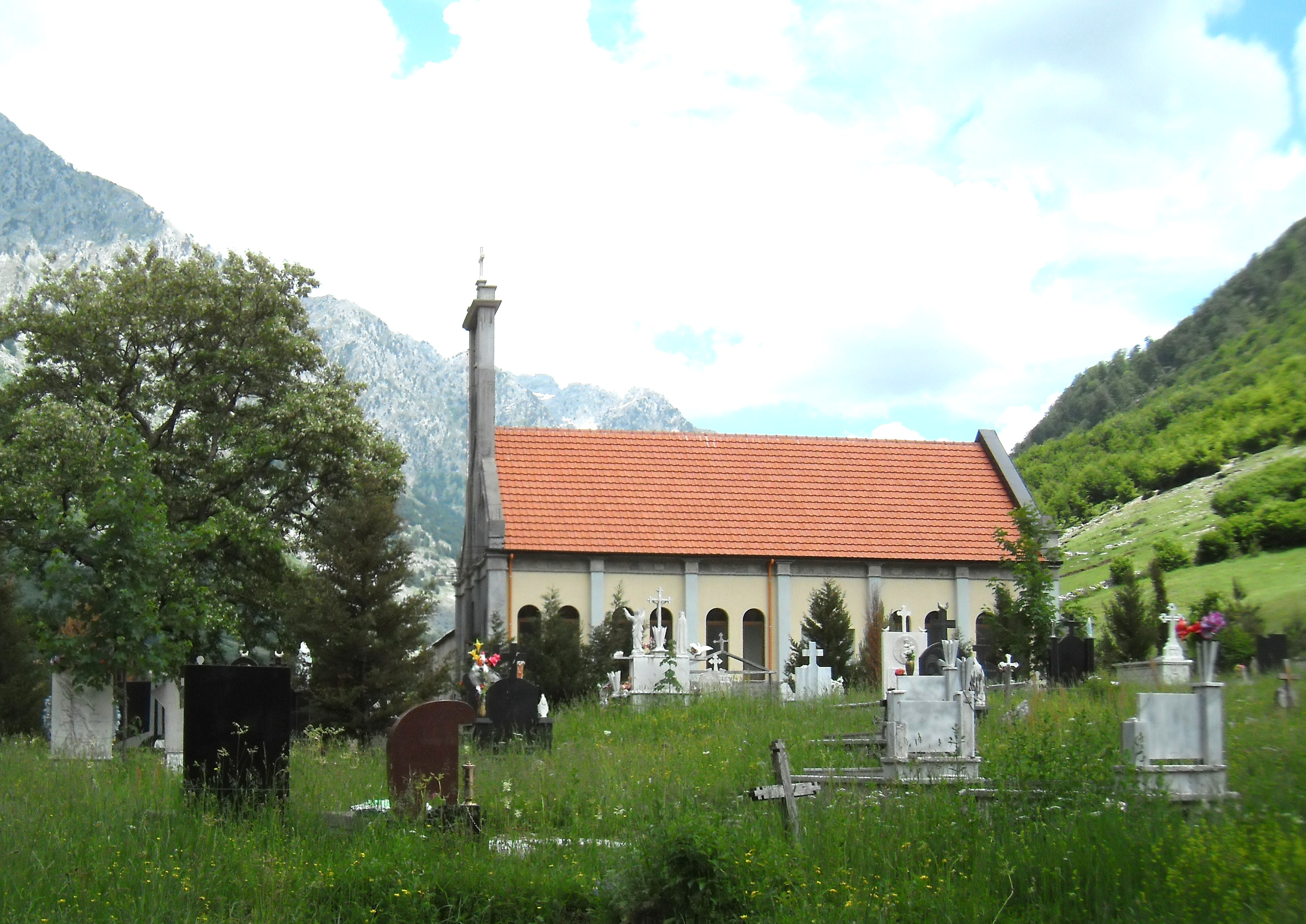 Kirche von Boga, Albanien